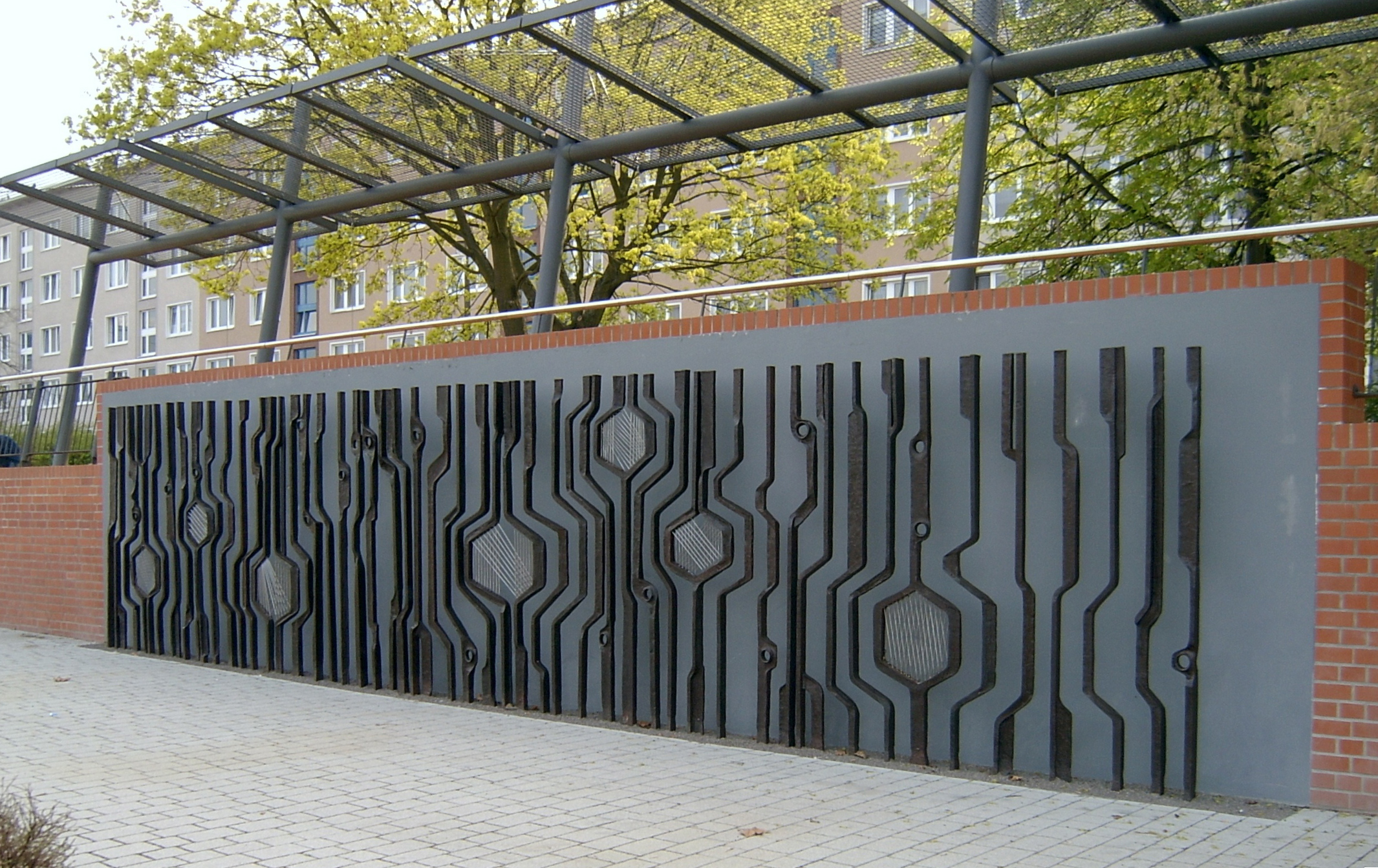 Die Wandgestaltung in Frankfurt (Oder) von Achim Kühn (*1942) befindet sich auf der Oderpromenade in Höhe der Musikschule. Die fünf Meter lange Stahlwand wurde kurz vor Ostern 2006 wieder Teil des Stadtbildes. Ursprünglich hatte Kühn 1972 vom Rat der Stadt den Auftrag erhalten an der Neugestaltung der Oderpromenade mitzuwirken. Unmittelbar nach dem Oderhochwasser 1997 wurde das Werk demontiert und von der Stadt eingelagert. Nach Drängen des Künstlers und einer 10.000 € teuren Restauration ist das Werk jetzt wieder öffentlich zu sehen.